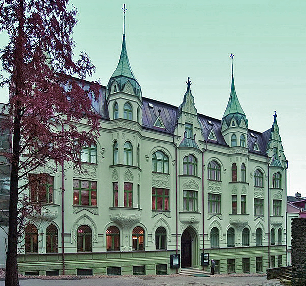 Hlavní budova Muzea skla a bižuterie v Jablonci nad Nisou